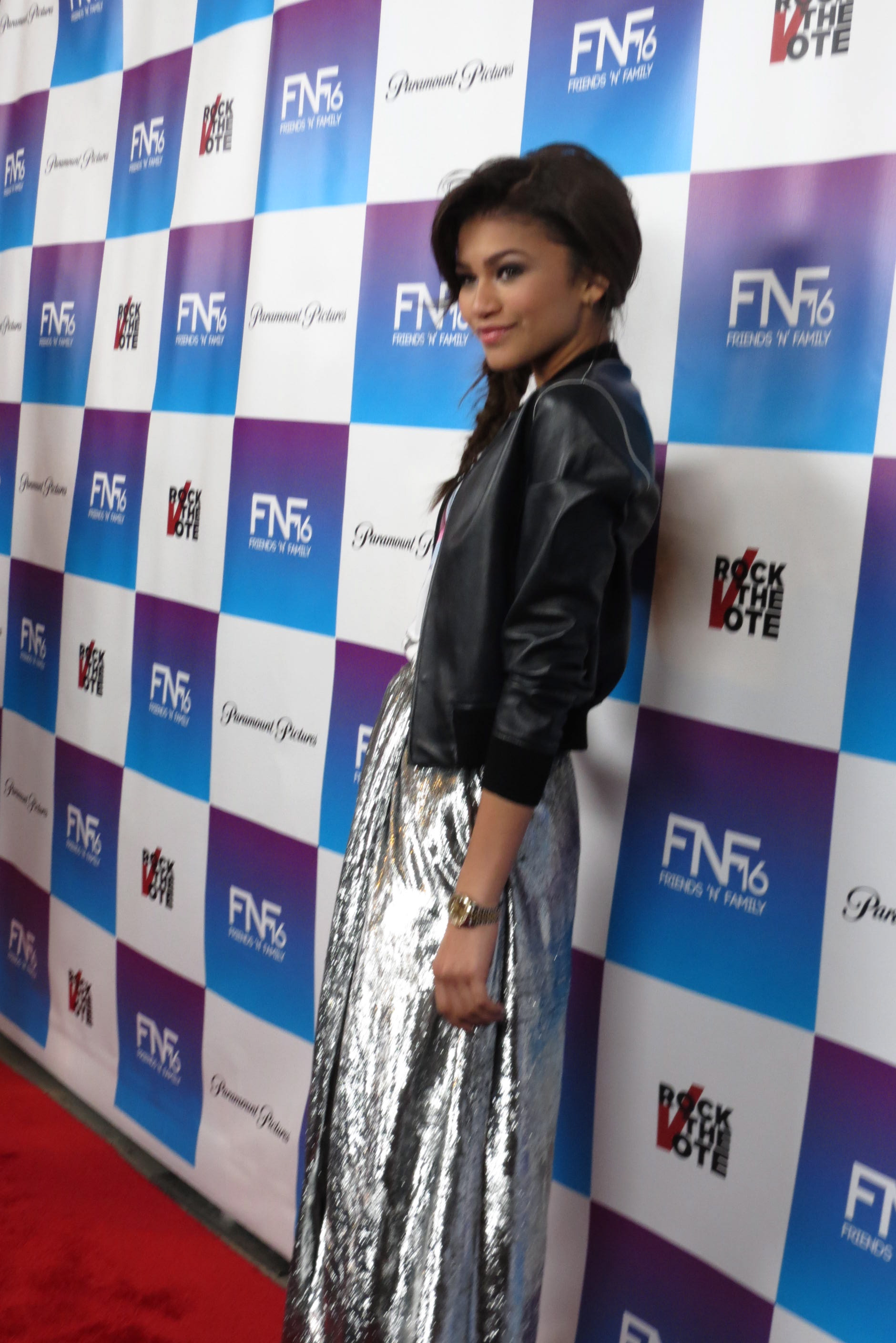 Zendaya